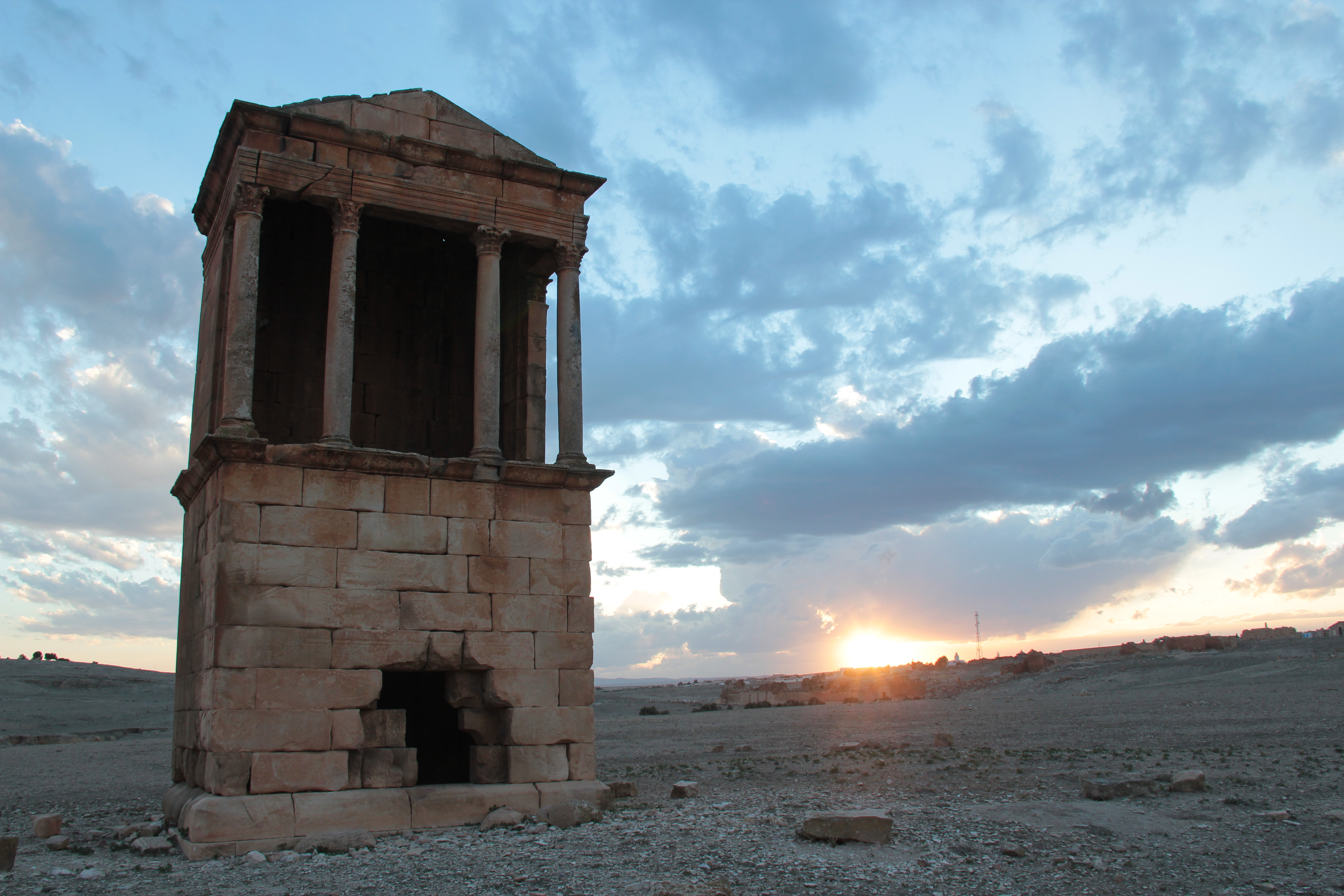 Région de Haïdra - Mausolée Tétrastyle d'Ammaedara